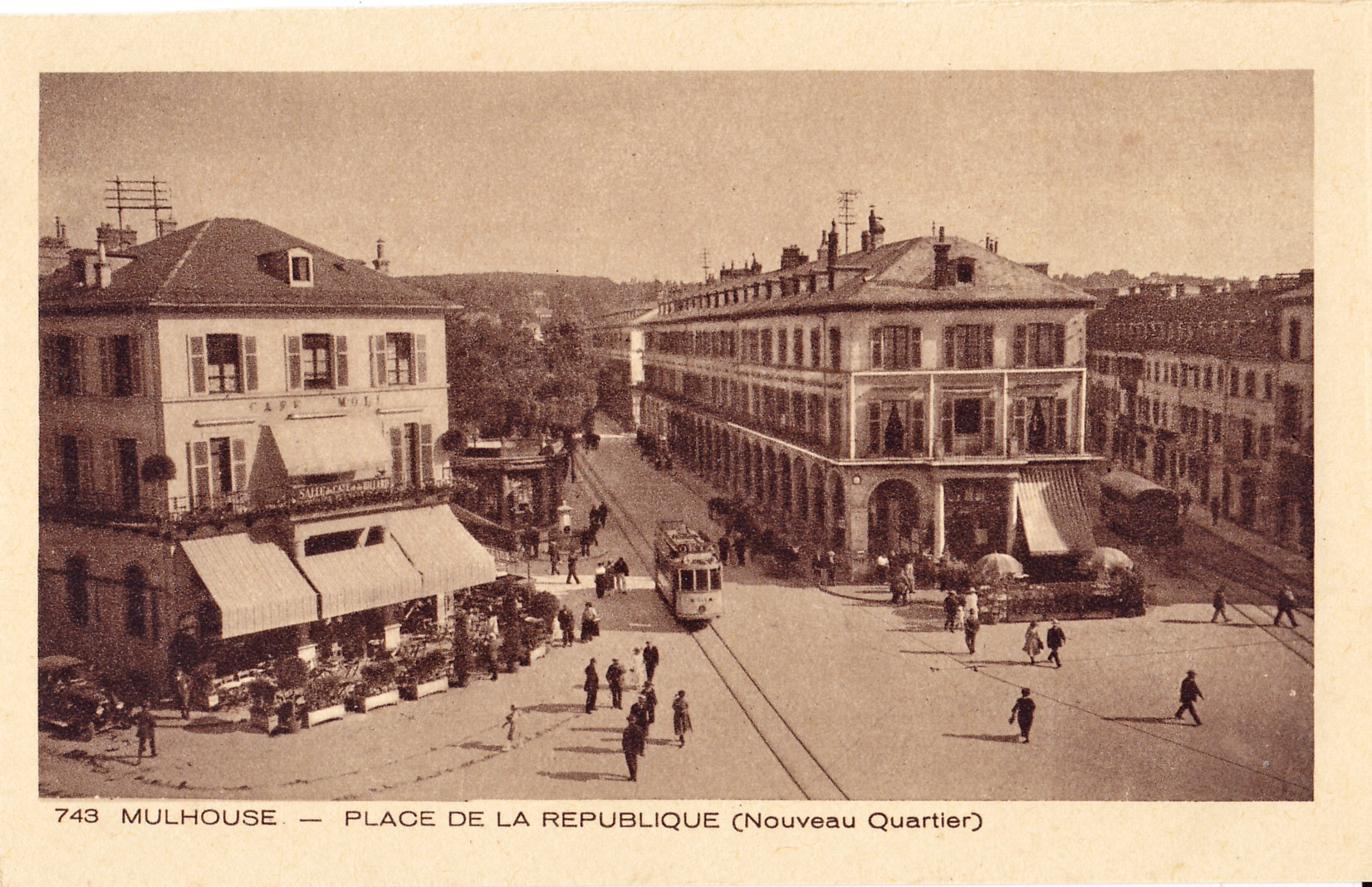 Carte postale ancienne éditée par Braun, n°743 :MULHOUSE - Place de la République (Nouveau Quartier)